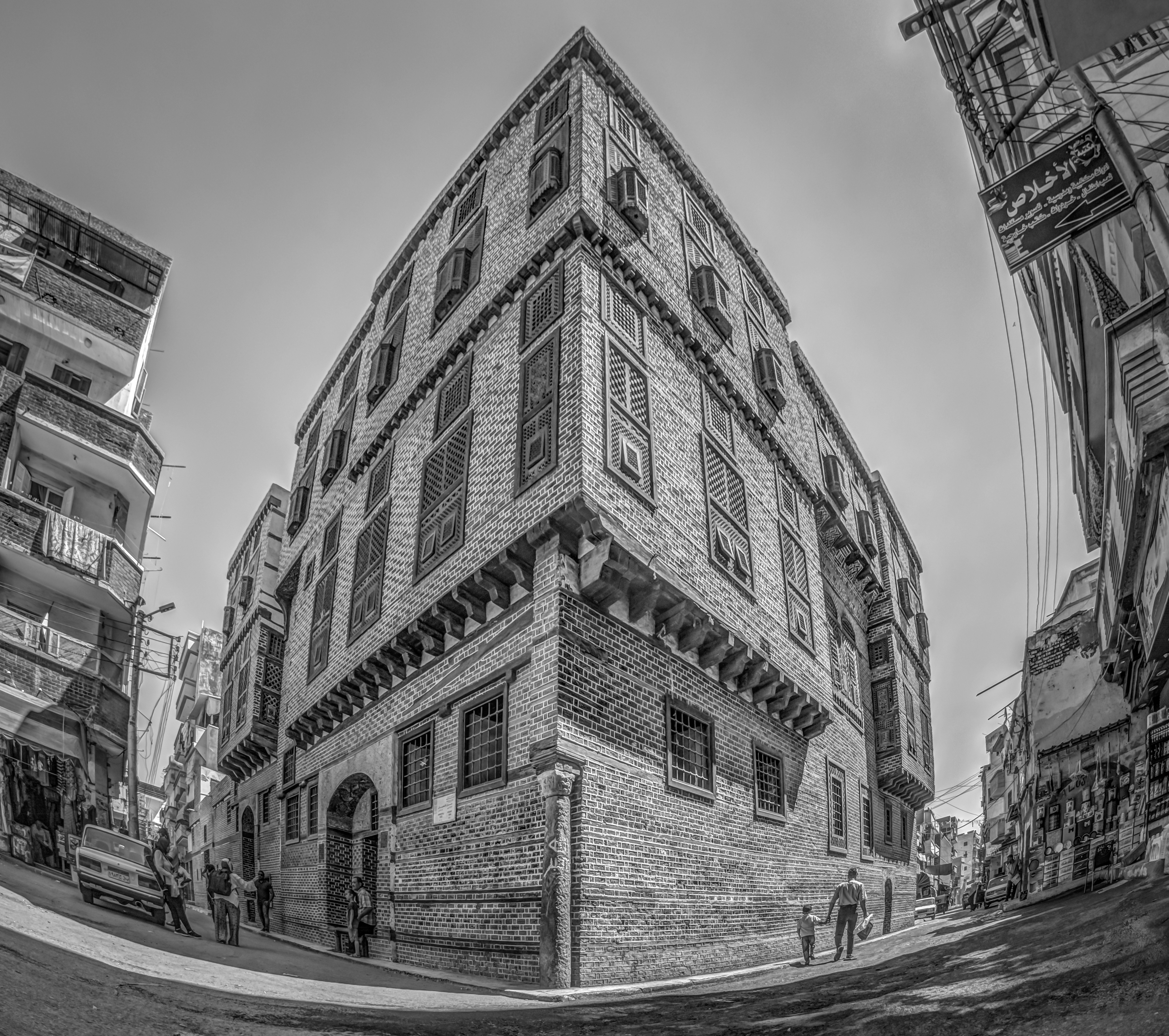 منزل الأمصيلي بمدينة رشيد انشئ عام 1808 ميلادية الموافق عام 1223 ميلادية